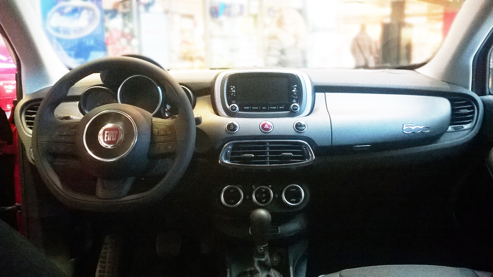 abitacolo e strumentazione di una Fiat 500X versione 4x4 accessoriata